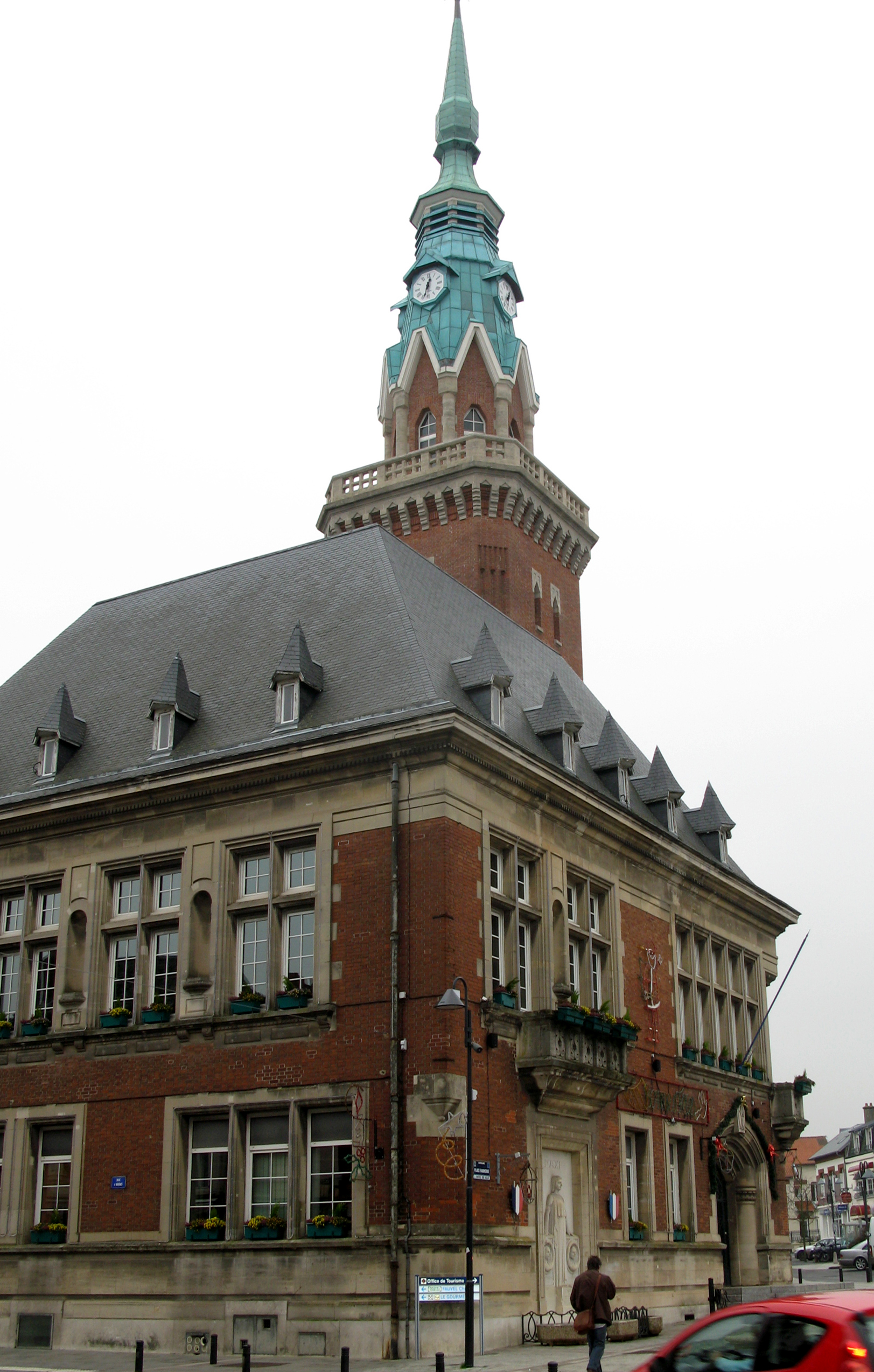 Bapaume (Pas-de-Calais, France) - L'hôtel-de-ville. .